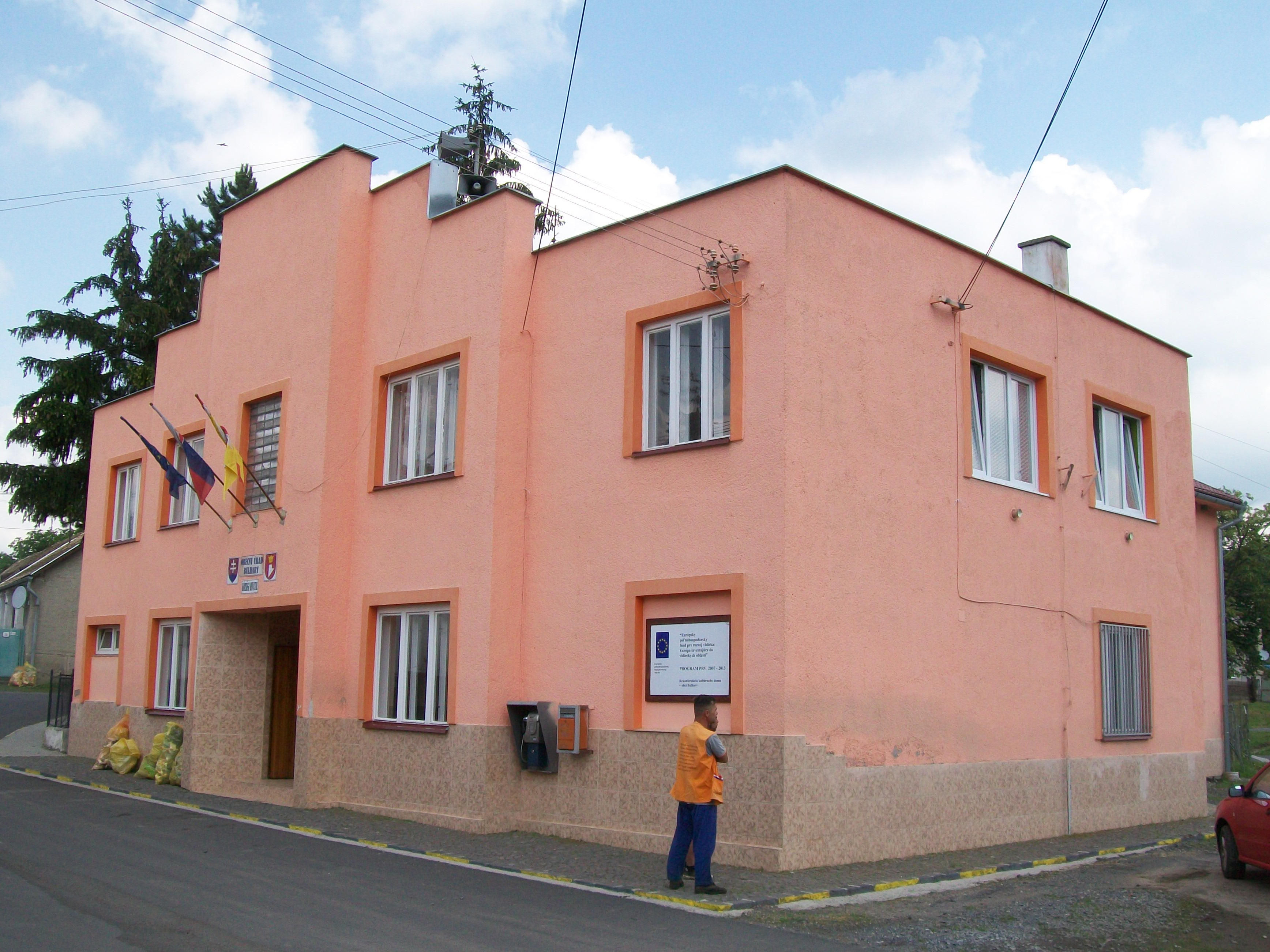 Obecný úrad v obci Bulhary